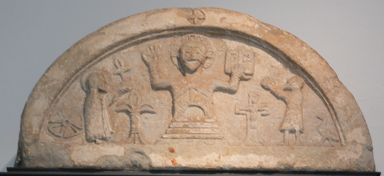 Tympanon mit der apokalyptischen Wiederkehr Christi, 12. Jahrhundert, Sandstein; vom Westportal der ehem. Martinskirche in Elstertrebnitz bei Leipzig Staatliche Kunstammlungen Dresden, Skulpturensammlung, SAV 2611 (ausgestellt im Schloßbergmuseum Chemnitz)